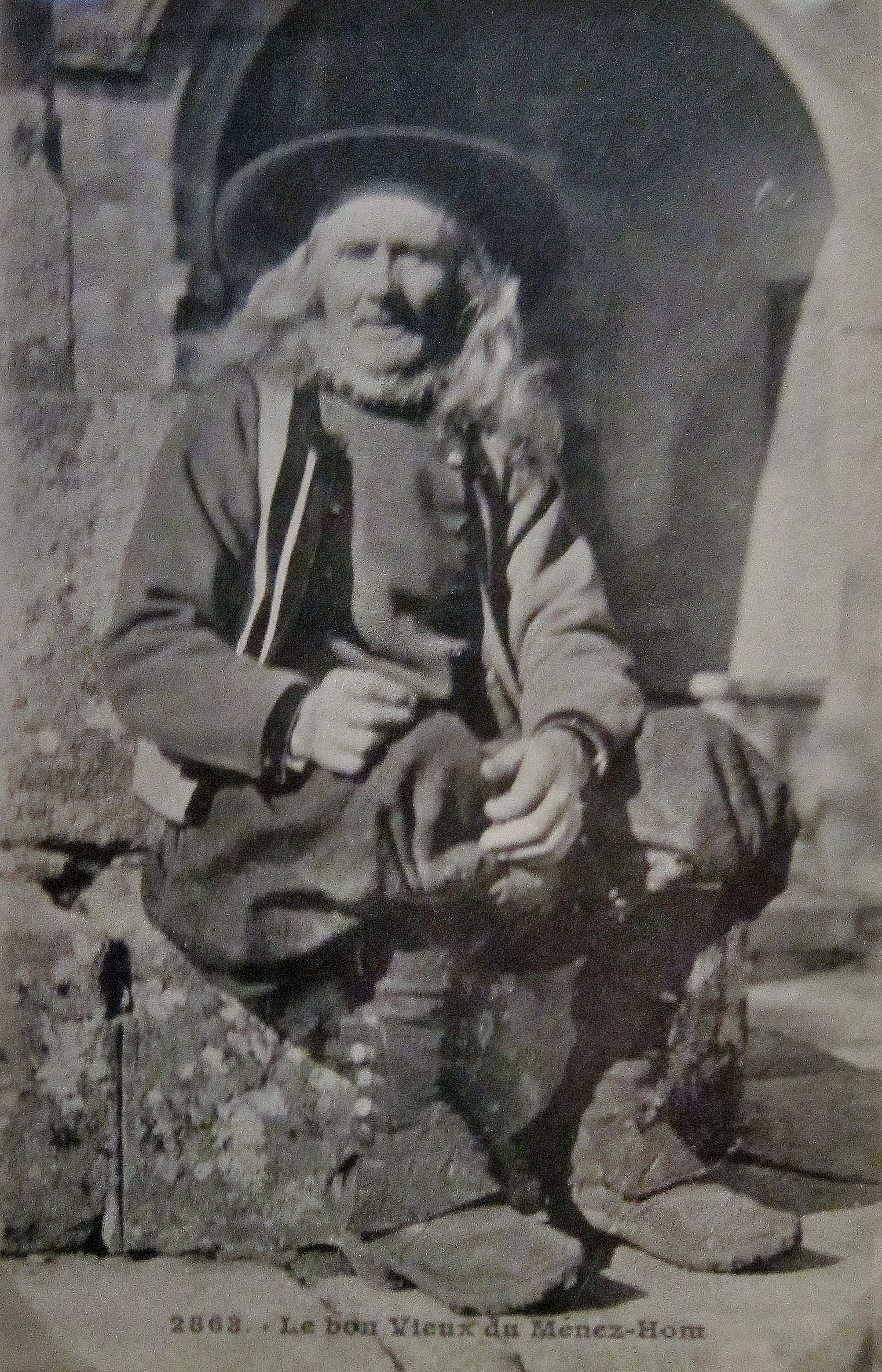 Le bon Vieux du Ménez-Hom (carte postale, vers 1900, auteur inconnu)